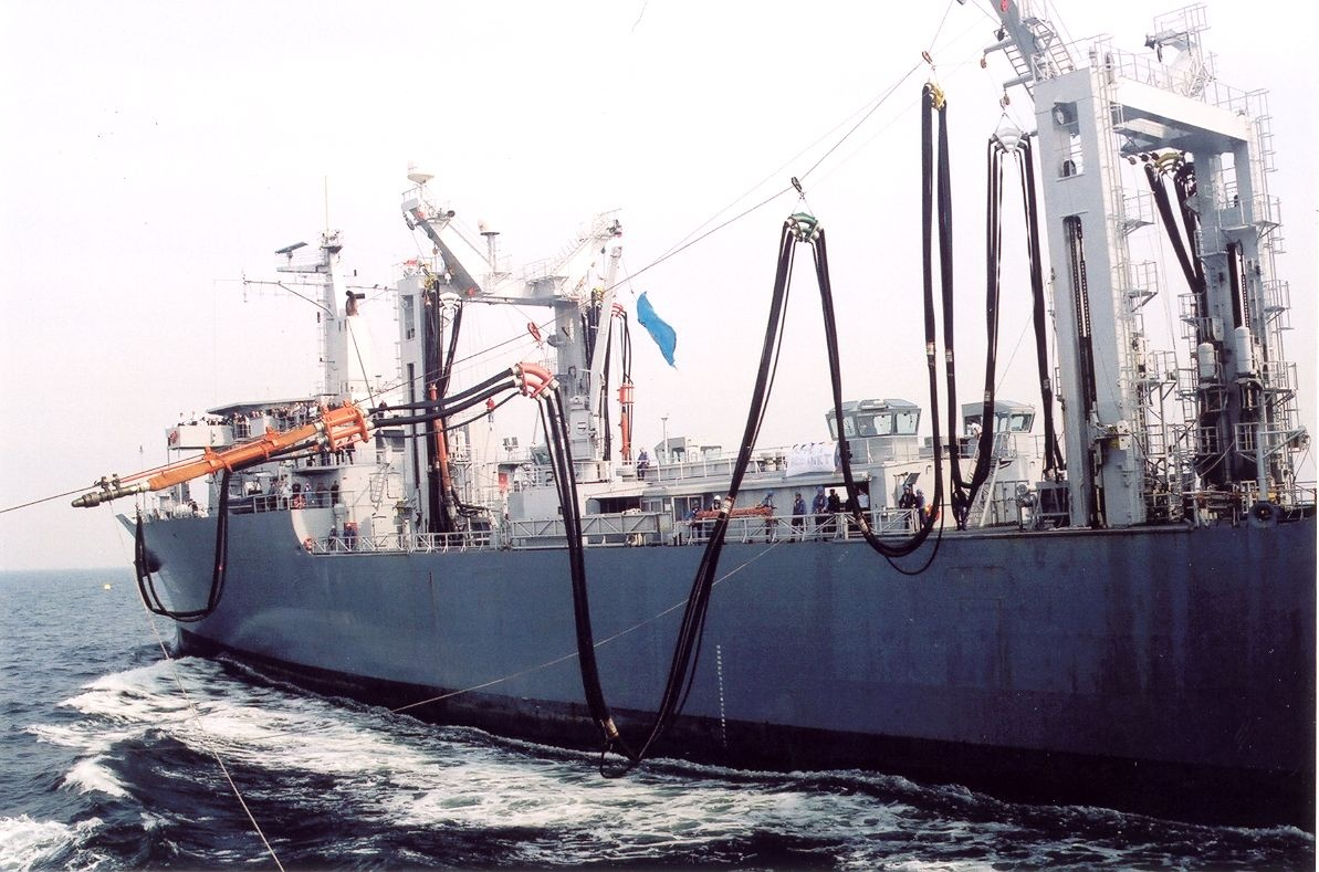 Hr. Ms. Amsterdam in actie als drijvend tankstation.